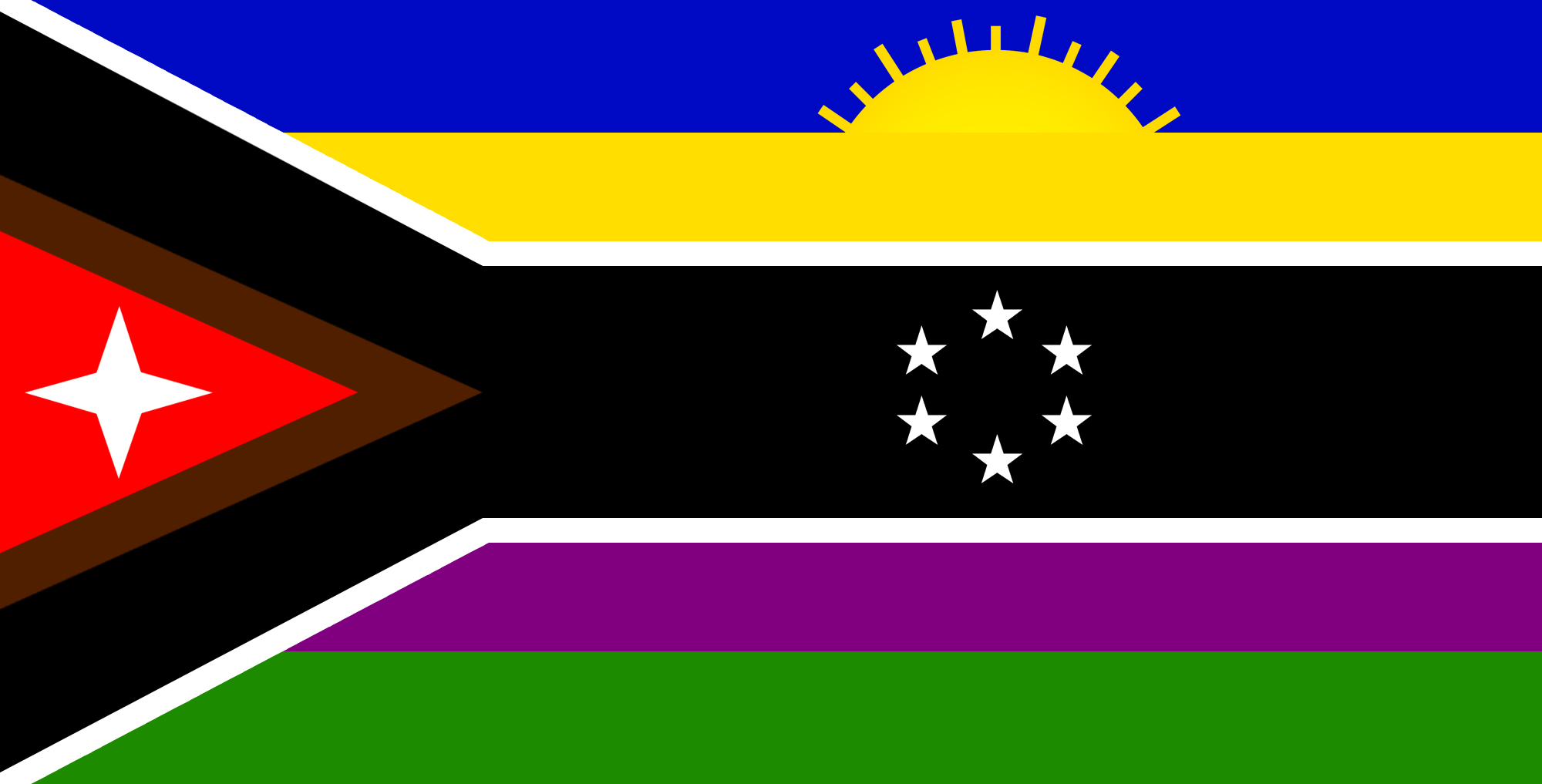 Bandera del municipio Sucre del estado Zulia